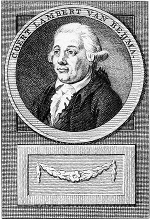 Court Lambertus van Beijma (1753 - 1820))